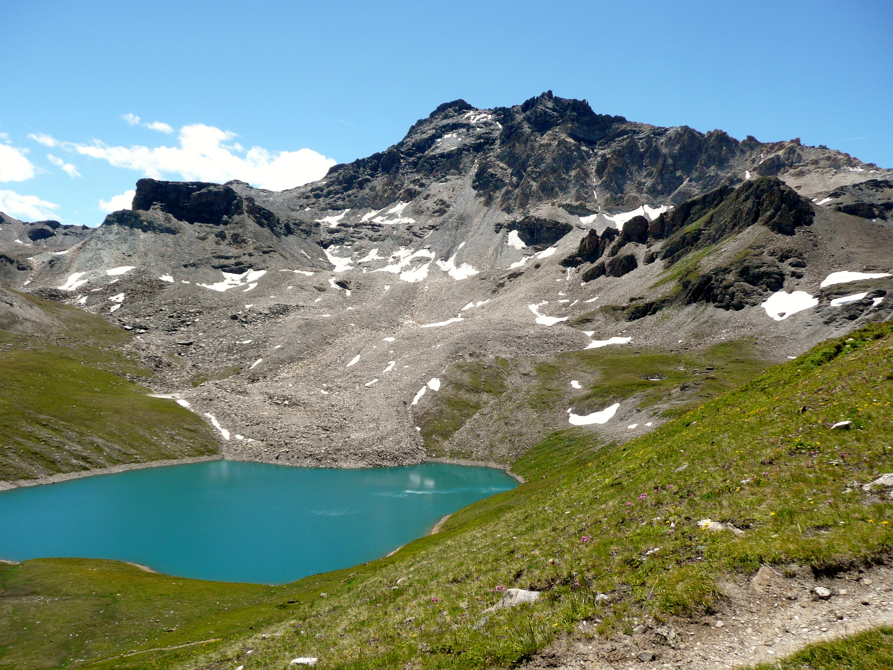 Lac de Lona bei Grimentz im Schweizer Kanton Wallis mit Sasseneire im Hintergrund.